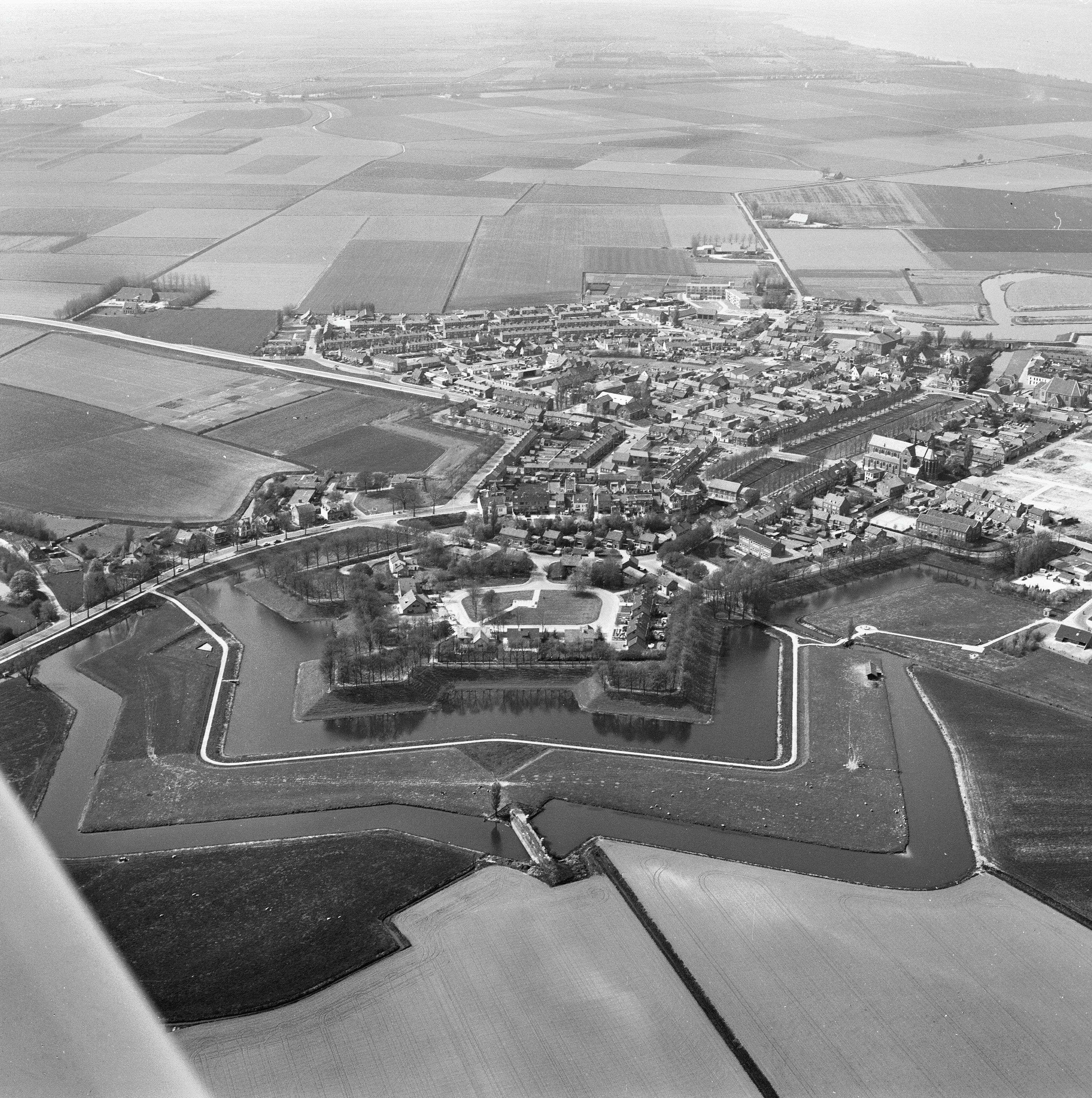 Plattegronden En Overzichten: luchtfoto's